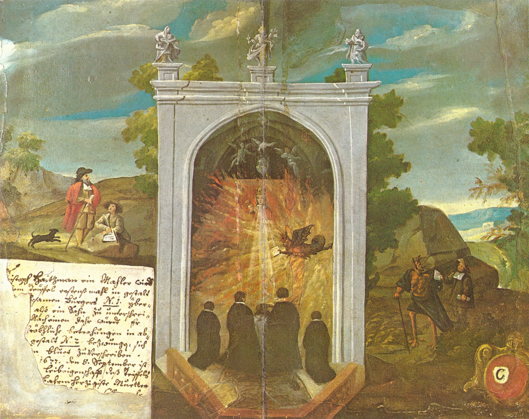 Votivgemälde (Triptychon) von Christoph Haizmann (1651–1700). Zwei Erscheinungen des Teufels und die Teufelsaustreibung in Mariazell.